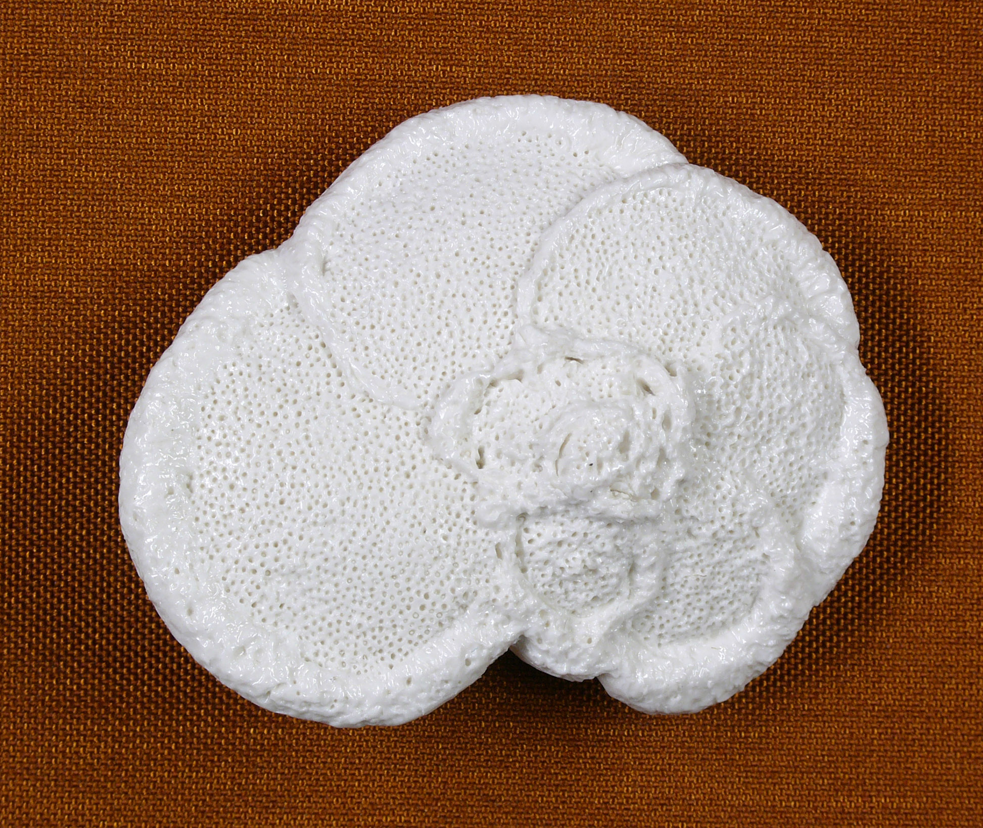 Model of the planktonic foraminifera Globorotalia menardii (model size 9 cm, original size 0.5 mm)